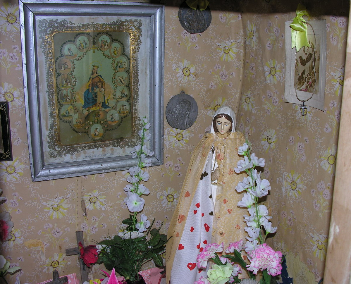 Liūdėnų kaimo koplytėlės vidus, Mažeikių raj., Šerkšnėnų sen. Foto: Algirdas, 2006 m. gegužės 16 d.